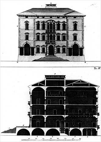 Villa Contarini a Piazzola sul Brenta (Padova). Disegno da Francesco Muttoni, 1760 Sezione del corpo principale